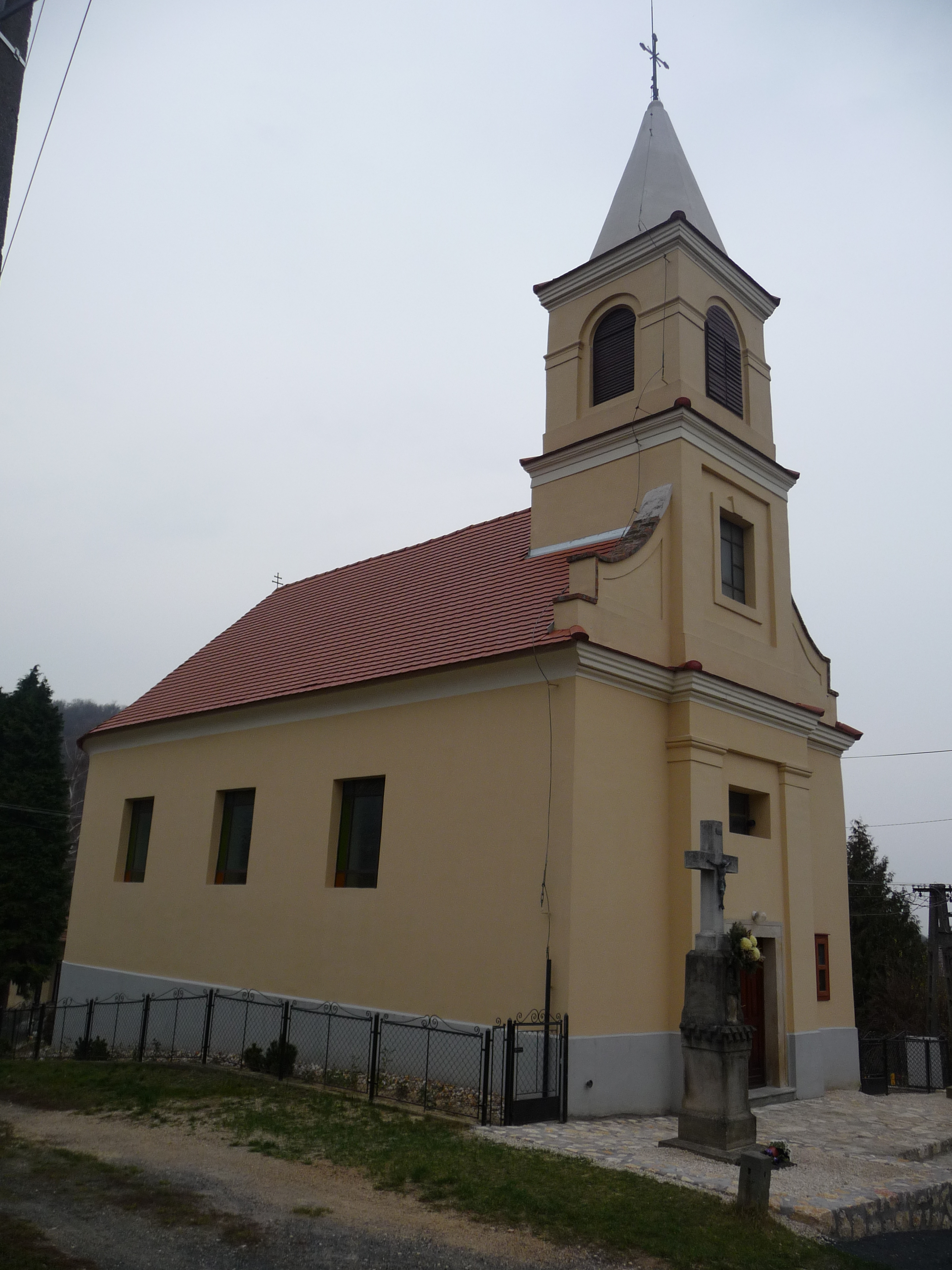 Szent Mihály római katolikus templom, Vállus